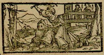 Extrait de la page de couverture du Quinti Horatii Flacci epodon liber. Auteur : Horatius Flaccus, Quintus. Éditeur : apud Pamphilum G. Date d'édition : 1517. Identifiant